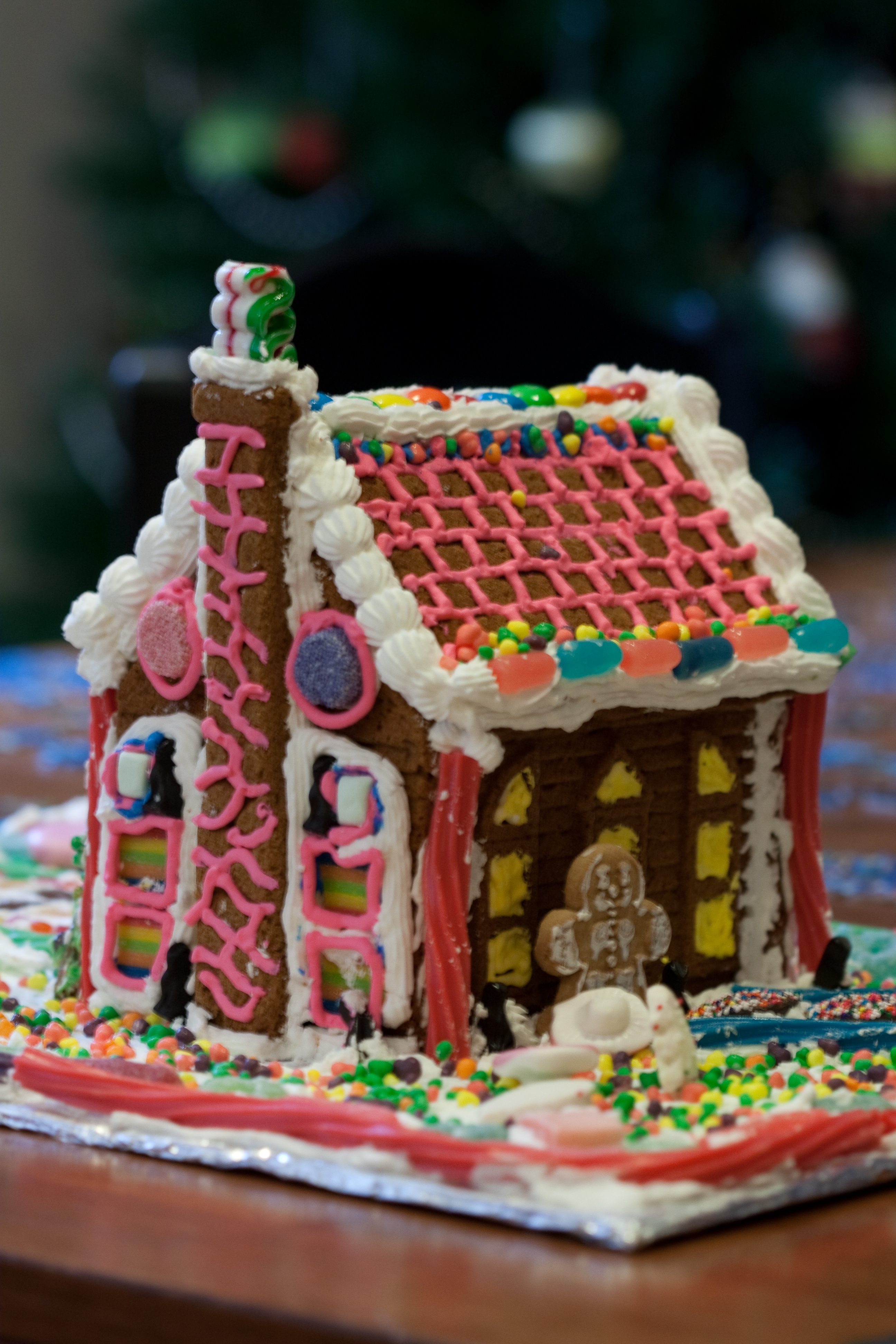 Neela's Gingerbread House